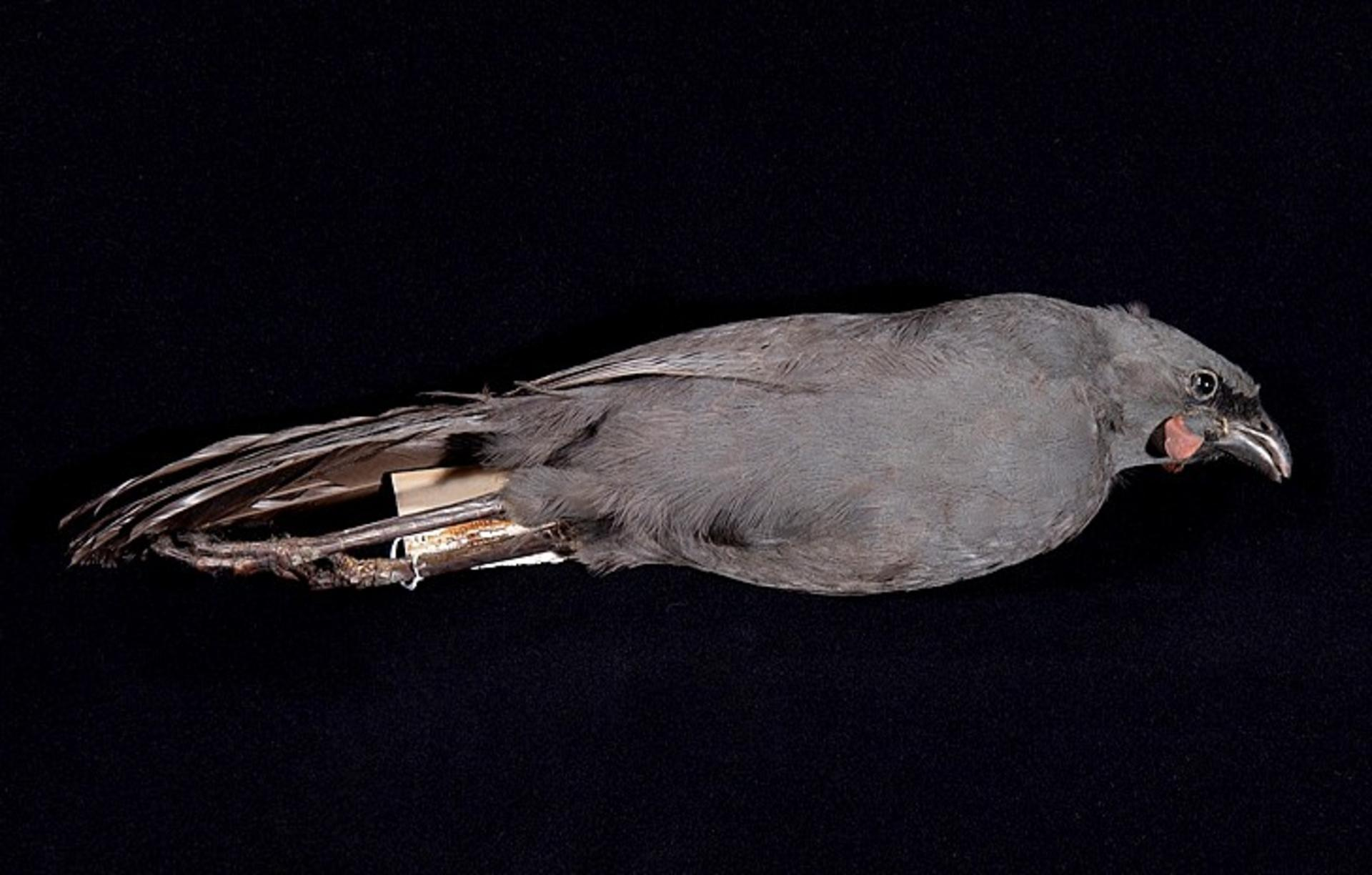 Callaeas cinerea cinerea Gmelin, J.F., 1788